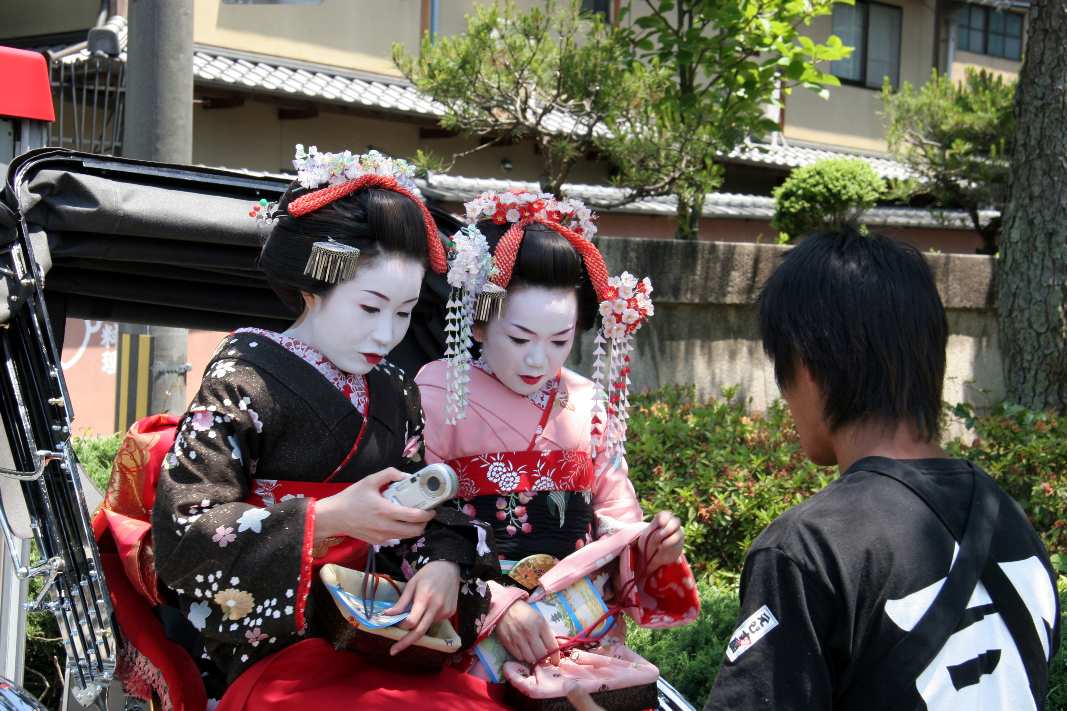 Japon, Kyoto, deux touristes costumées en geisha dans le vieux Kyoto